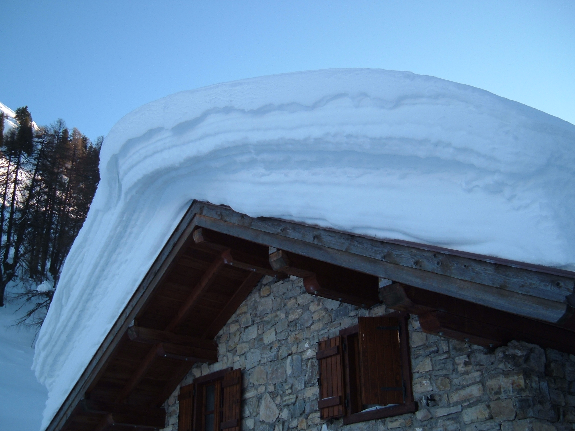 Malga Meda d'inverno